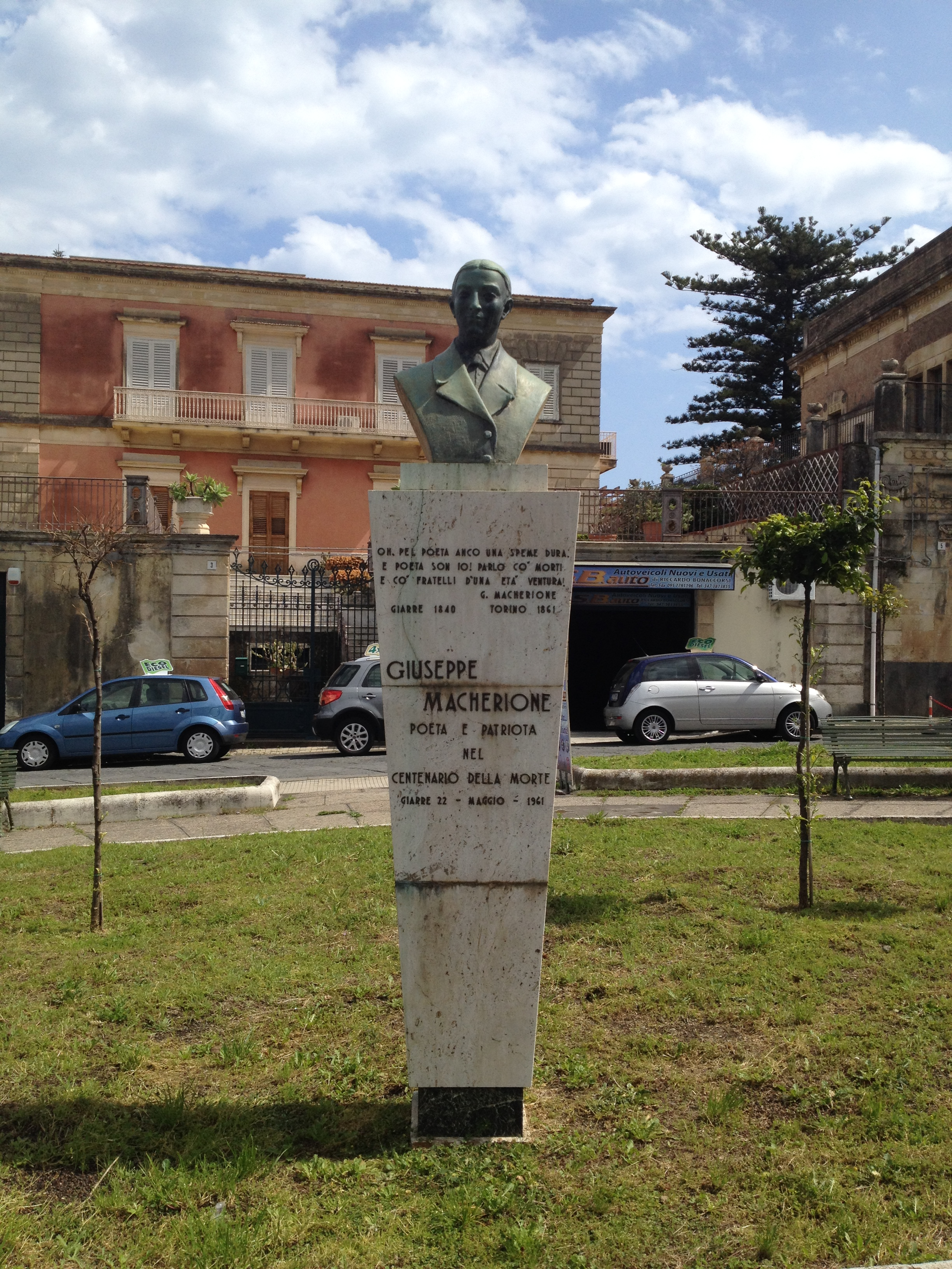 Busto di Giuseppe Macherione, Giarre (CT), Italia